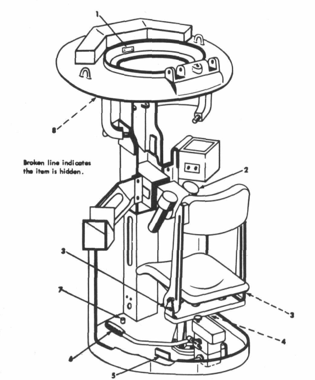 MBT-70 driver capsule.